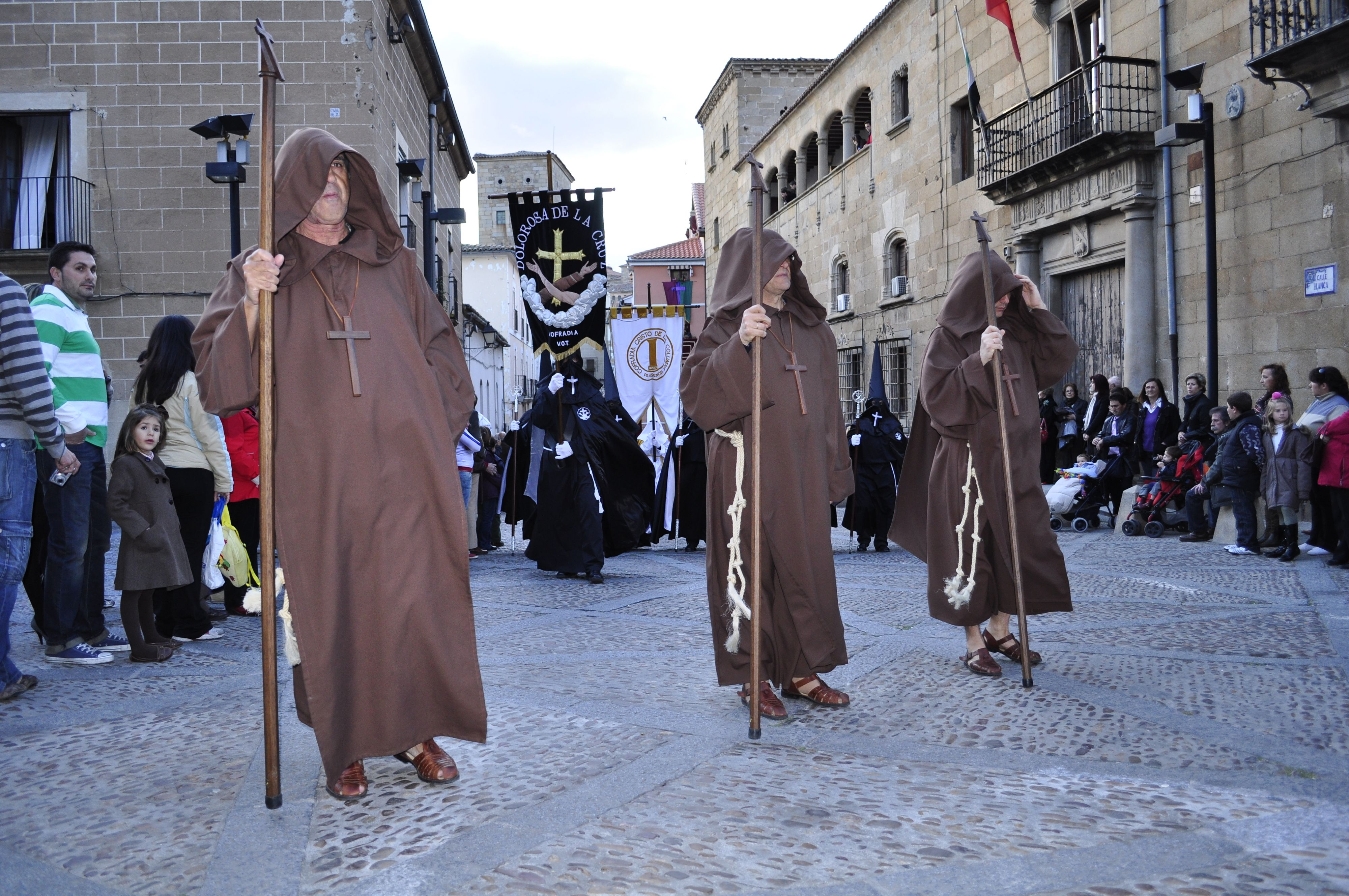 Cofradia de la Soledad y Santo Sepulcro. Hermano Mayor: Narciso Juanals Parroquia: Santo Domingo Año de Fundación: Comienzos del Siglo XV Hermano Mayor: Narciso Juanals Hora de salida: 19,30 horas Pasos:Nuestra Señora de la Soledad, Santo Sepulcro, San Juan María Magdalena y San Pedro Acompañamiento musical: La banda de música de la OJE de Plasencia Número de hermanos de la cofradía: 700 (